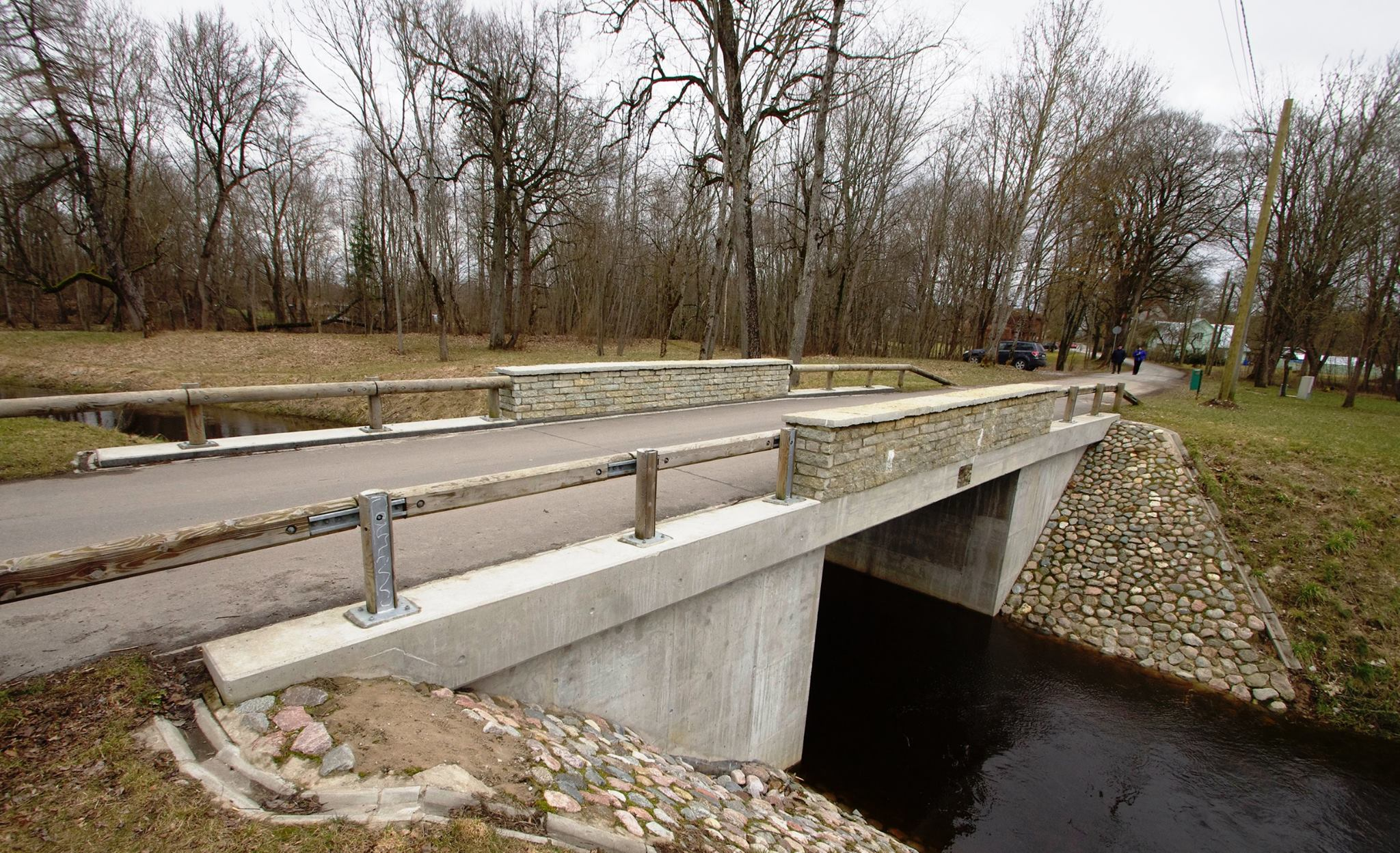 Keila jõesaare jalakäijate sild